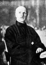 Pavlo Skoropadskiy, Hetman of Ukraine